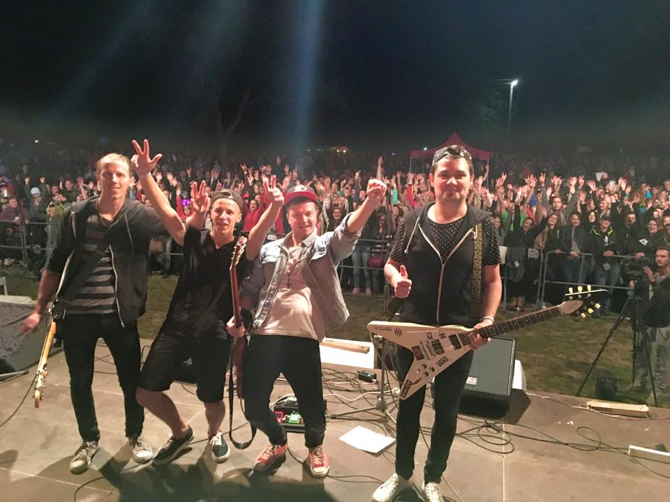 Oberačka po Sebechlebsky 2015